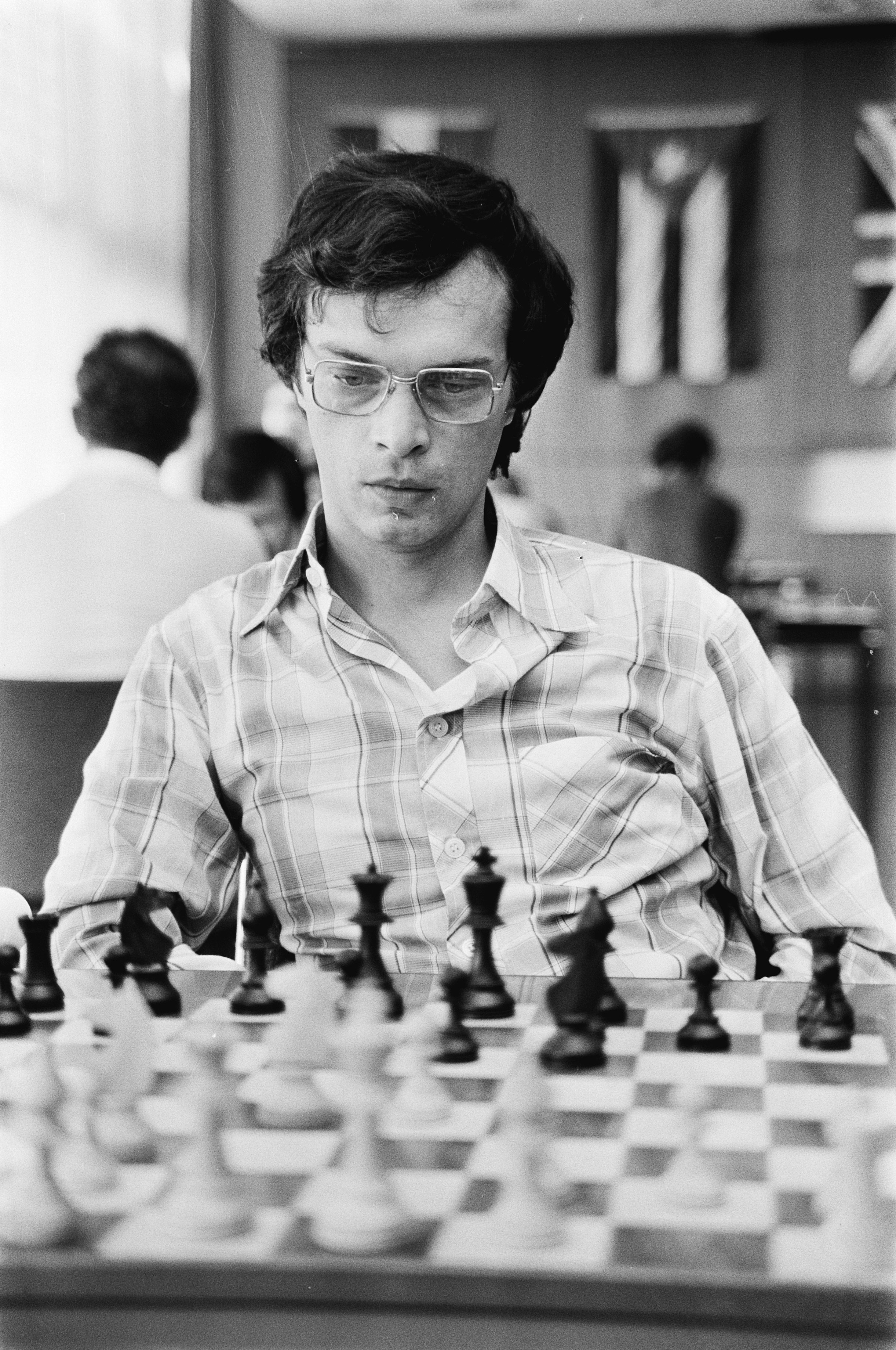 Gyula Sax